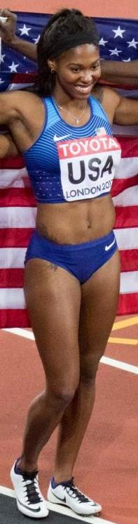 d8_76027 4x100m dames